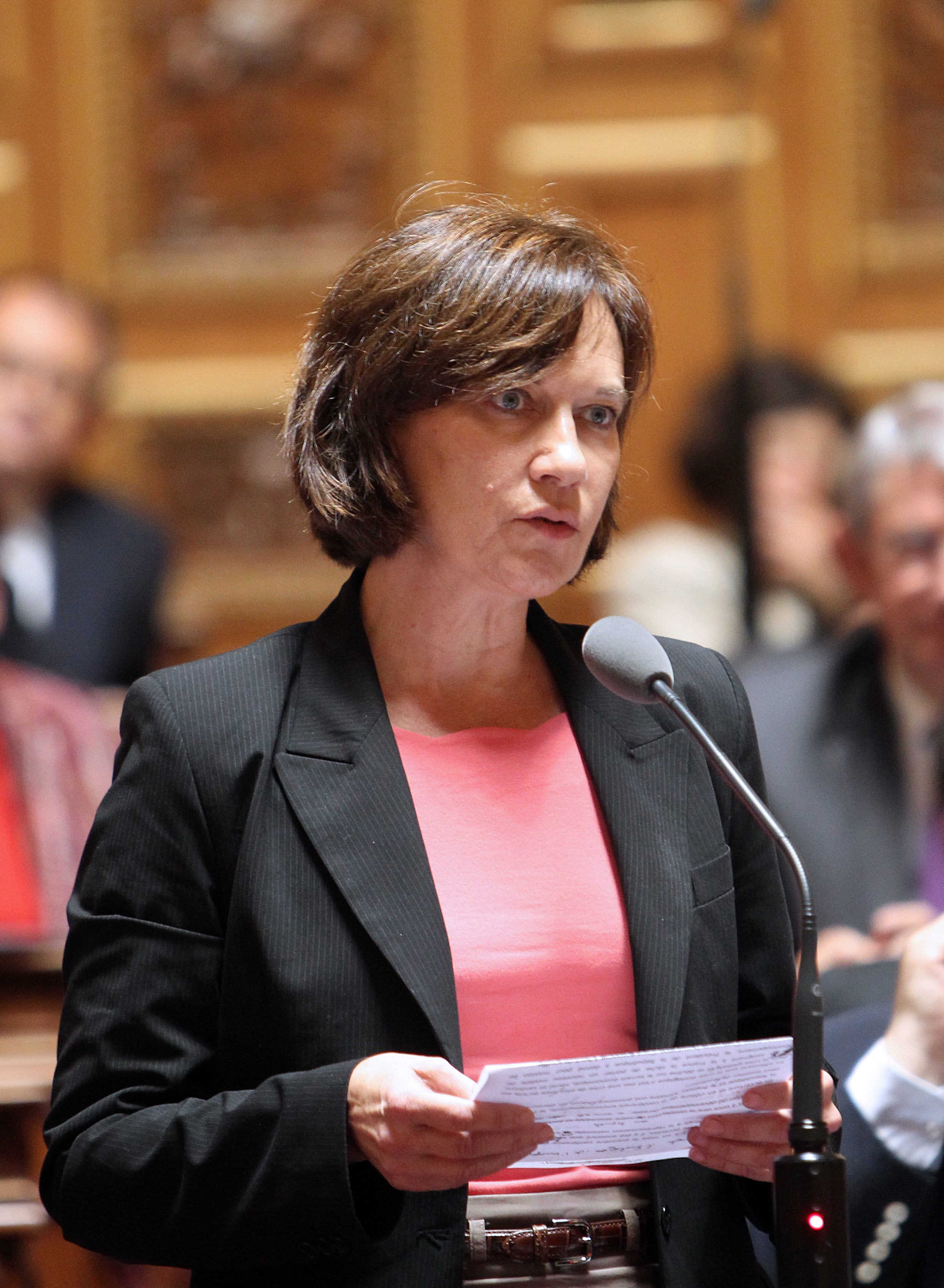 Laurence Rossignol, Sénatrice de l'Oise